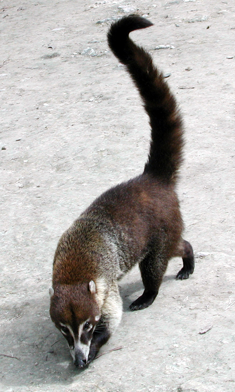 White-nosed Coati (Nasua narica)